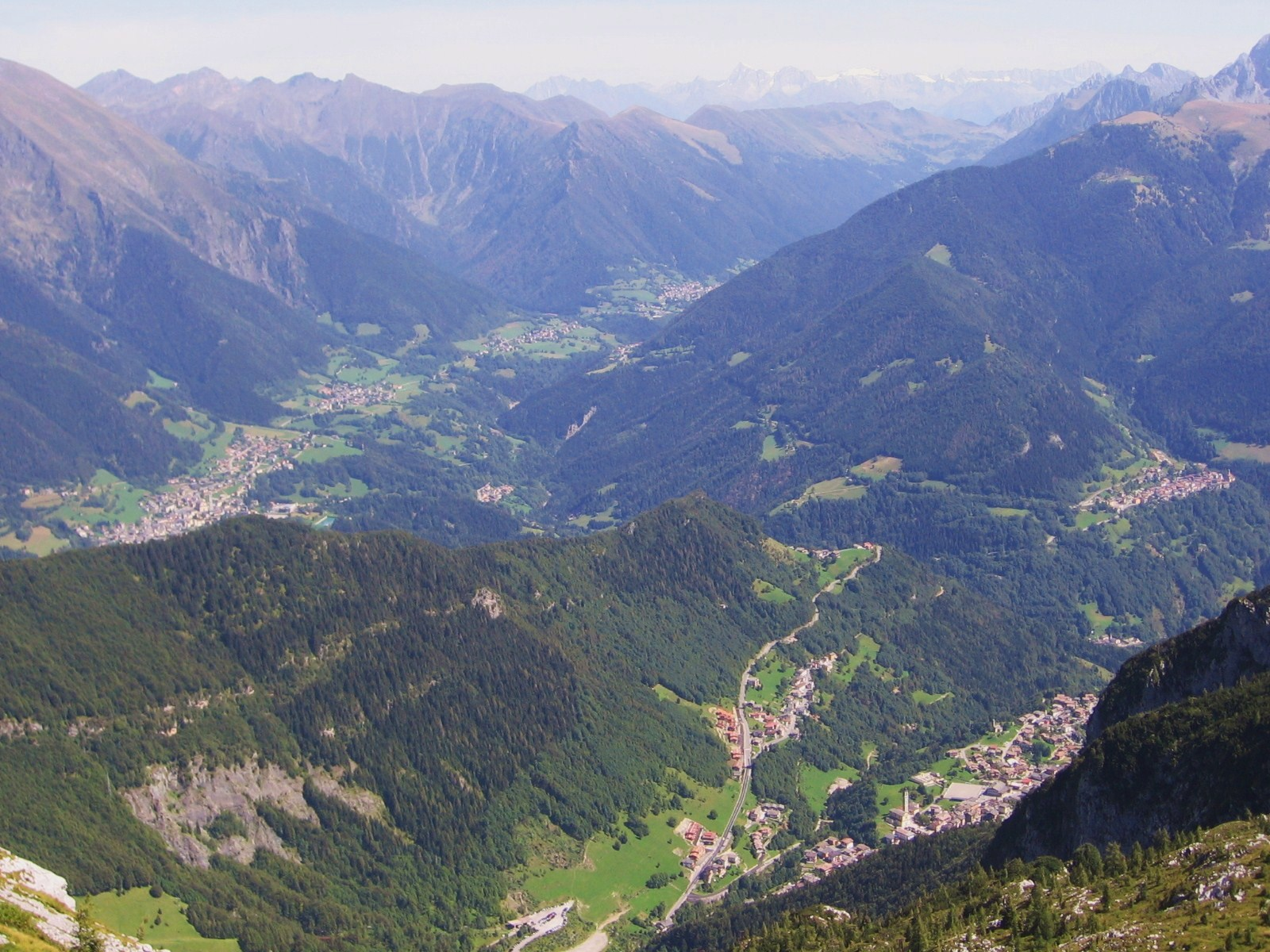 Valle di Scalve, Bergamo, Italy